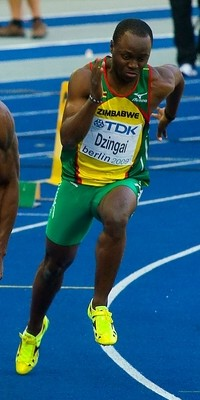 Brian Dzingai, Berlin 2009